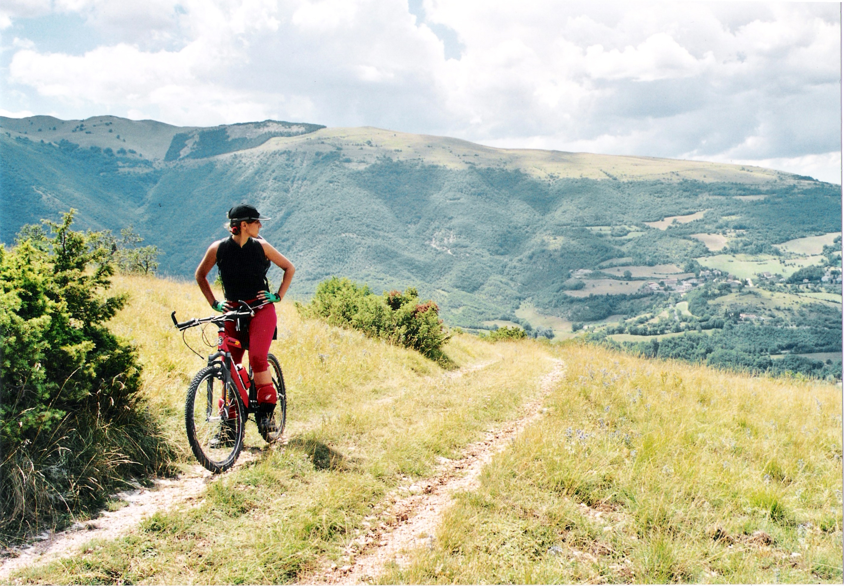 In mountain bike nel parco dei Sibillini